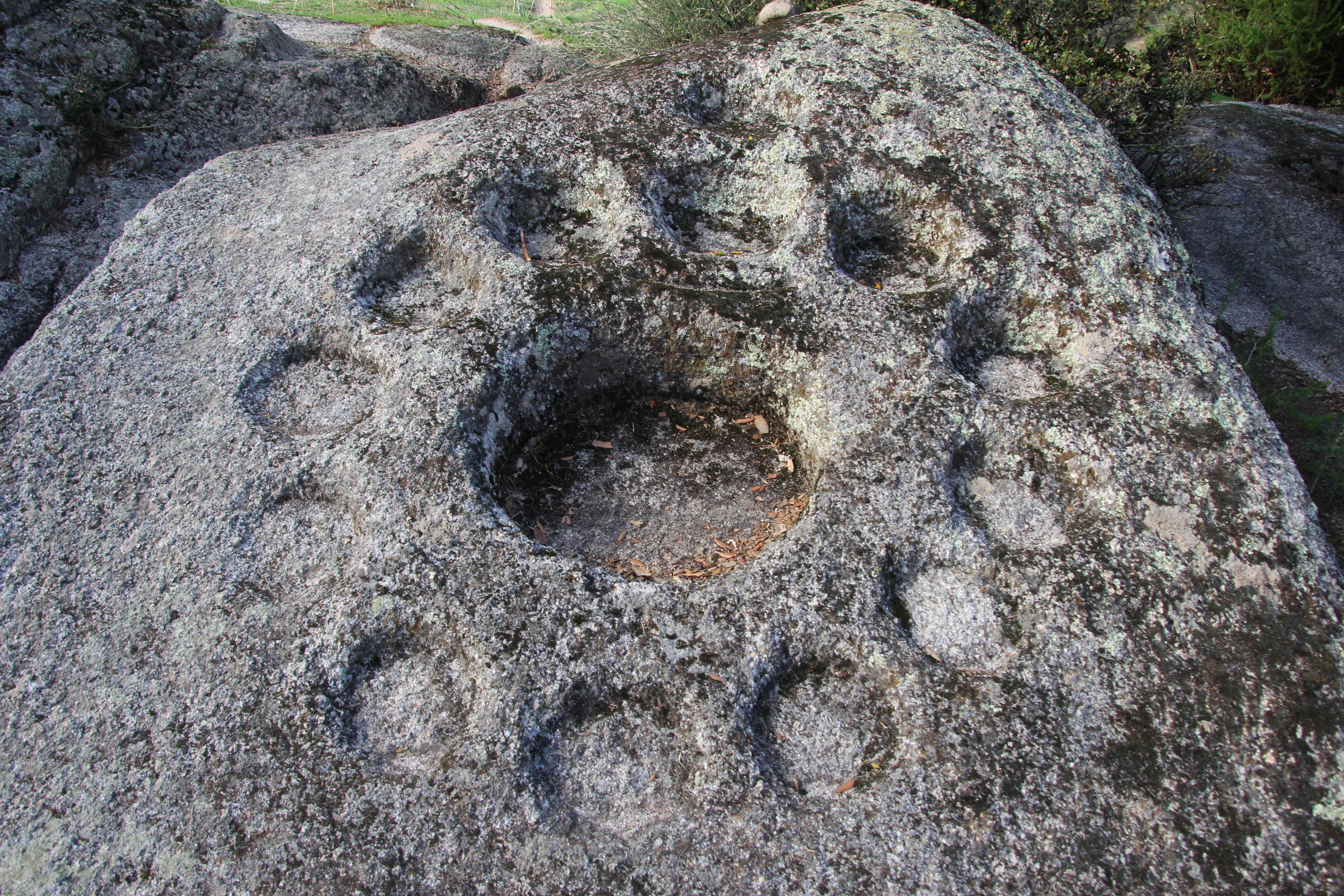 Oschiri - Altare rupestre di Santo Stefano